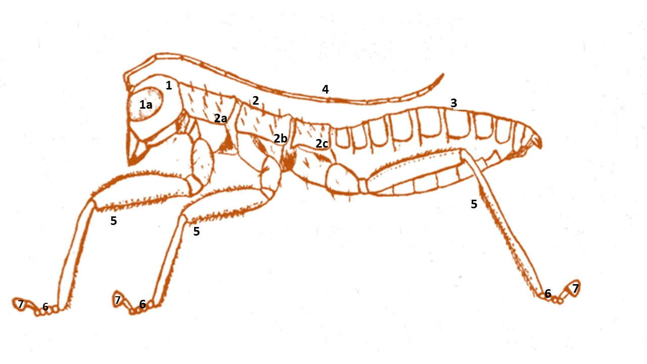 Divisões do Corpo de um Mantophasmatodea